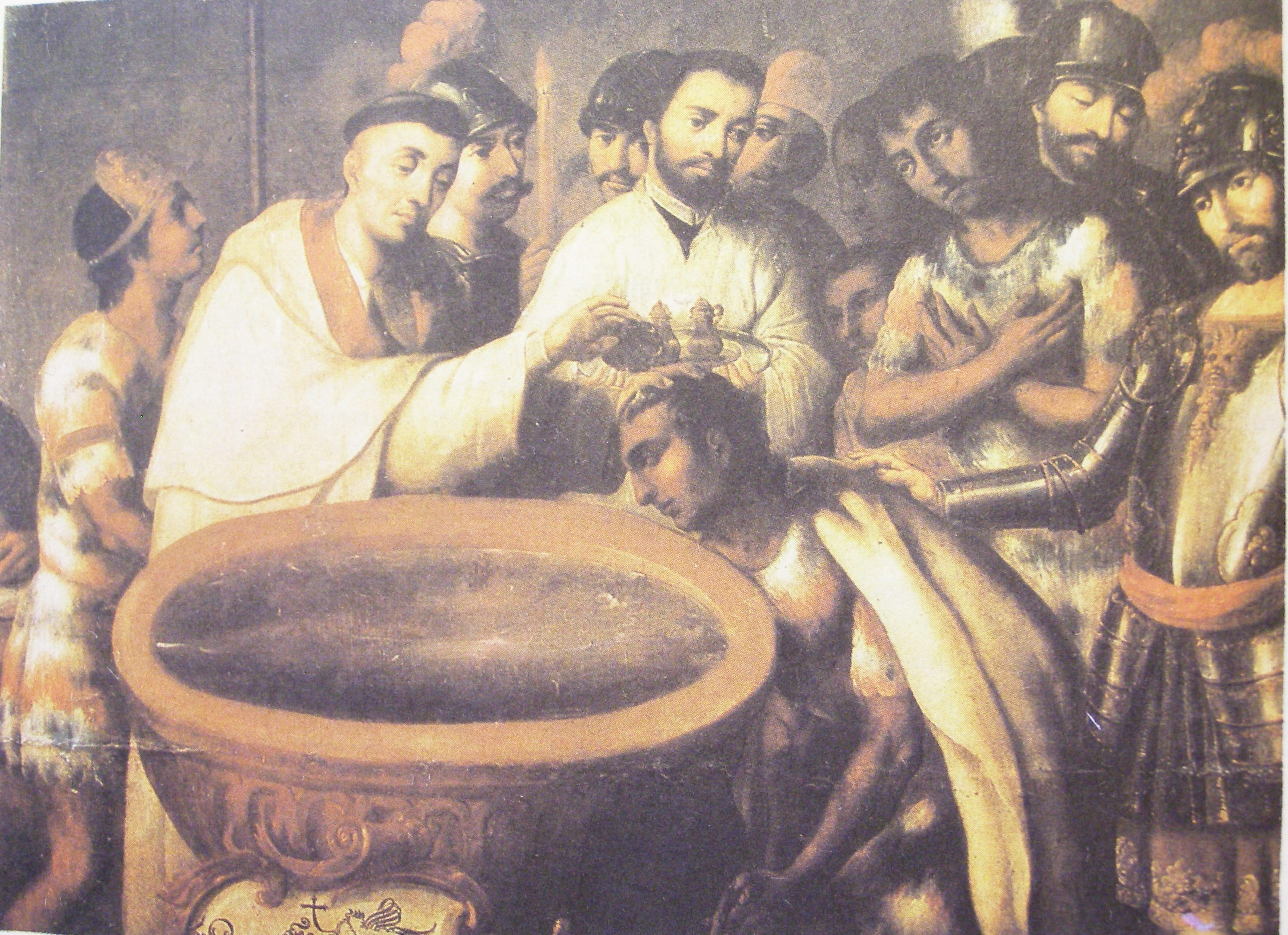 Крещение ацтеков в Мексике. Картина неизвестного художника